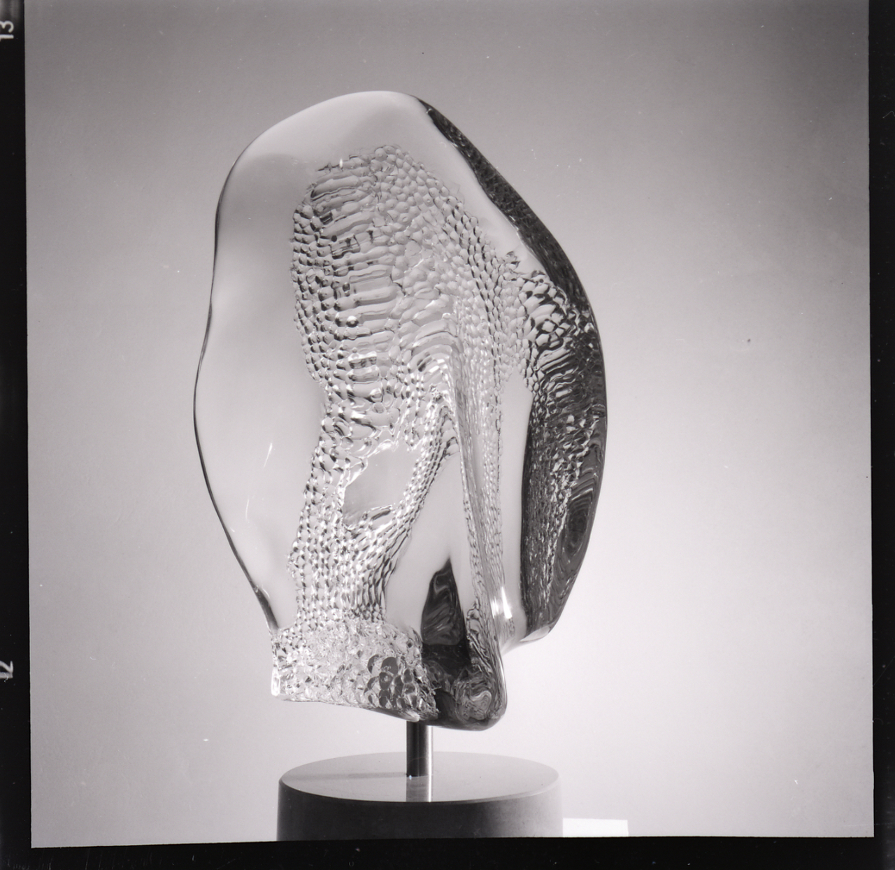 Servizio fotografico : Venezia, 1967 / Paolo Monti. - Buste: 29, Fototipi: 30 : Negativo b/n, gelatina bromuro d'argento/ pellicola ; 6x6. - ((Serie costituita da 29 buste sciolte di negativi identificati con i nn.: 13794, 13795, 13796, 13797, 13798 (duplicato di 13800), 13799, 13800, 13801, 13802, 13803, 13804, 13805, 13806, 13807, 13808, 13809, 13810, 13811, 13812, 13813, 13814, 13815, 13816, 13817, 13818, 13819, 13820, 13821, 13822, 13823. - La suddetta serie è contenuta nella scatola G13501-14000, formato 24x30. - Occasione: Documentazione per pubblicazione. - di Dorfles, Gillo: Luciano Vistosi, Venezia, Tip. Fantoni (1968). - Fonte: Agenda di Paolo Monti: Monti/ 3 aprile 1966 - 9 marzo 1971/ 12421-16823 (1966-1971), presso Archivio Paolo Monti. - Fonte: Fattura di Paolo Monti: IV. Commesse/ Fattura/ per vetri Luciano Vistosi (1967/12/28), presso Archivio Paolo Monti. 40 riprese sculture in vetro, 6 stampe 18x24, 40 stampe 24x30. - Fonte: Monografia